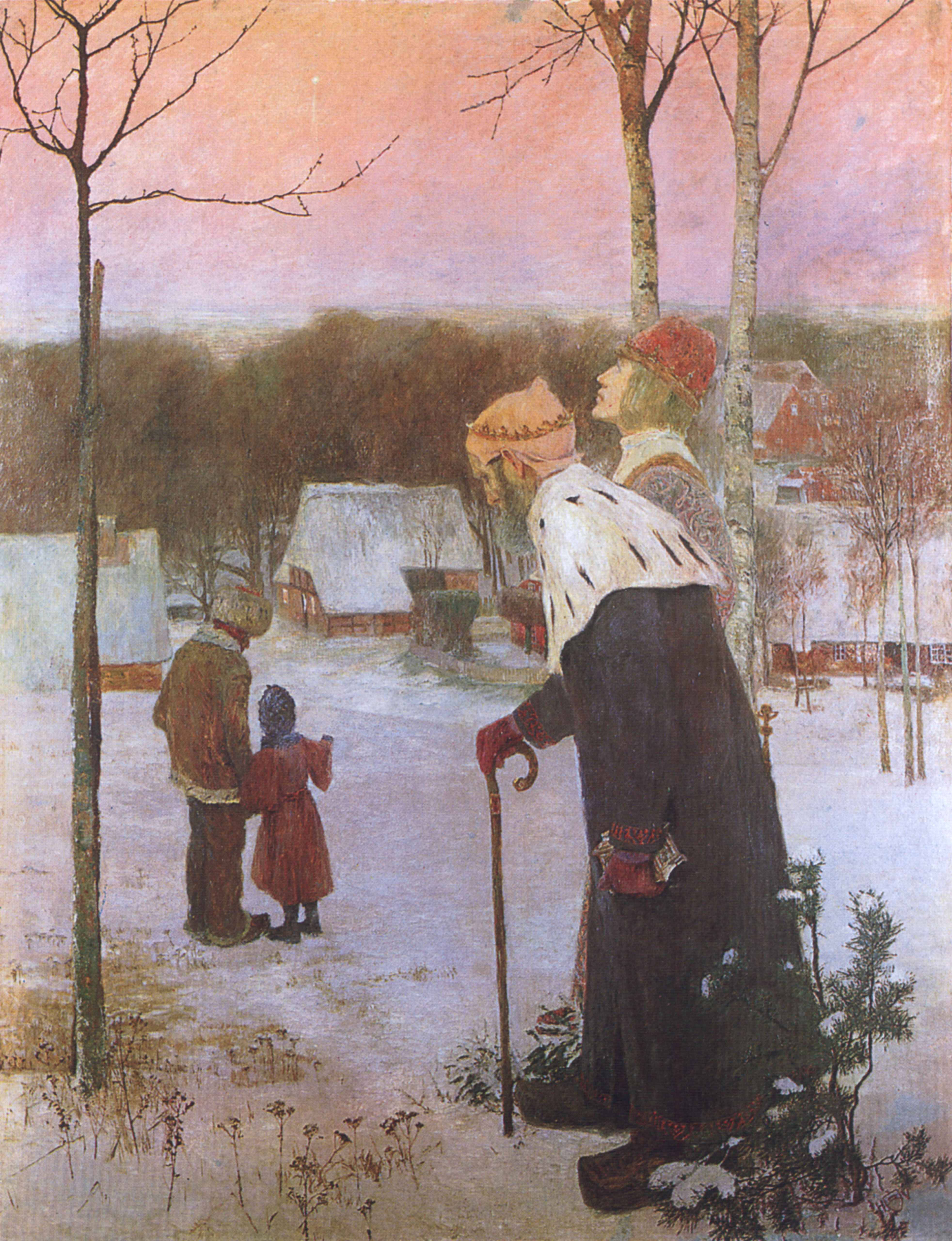 Wintermärchen (Die Heiligen Drei Könige). Öl auf Leinwand. 180 x 140 cm. Große Kunstschau Worpswede (erste Version des "Wintermärchens"; 1909 ähnlich auch als Radierung erschienen; 1908 folgte ein Gemälde mit gleichem Titel)